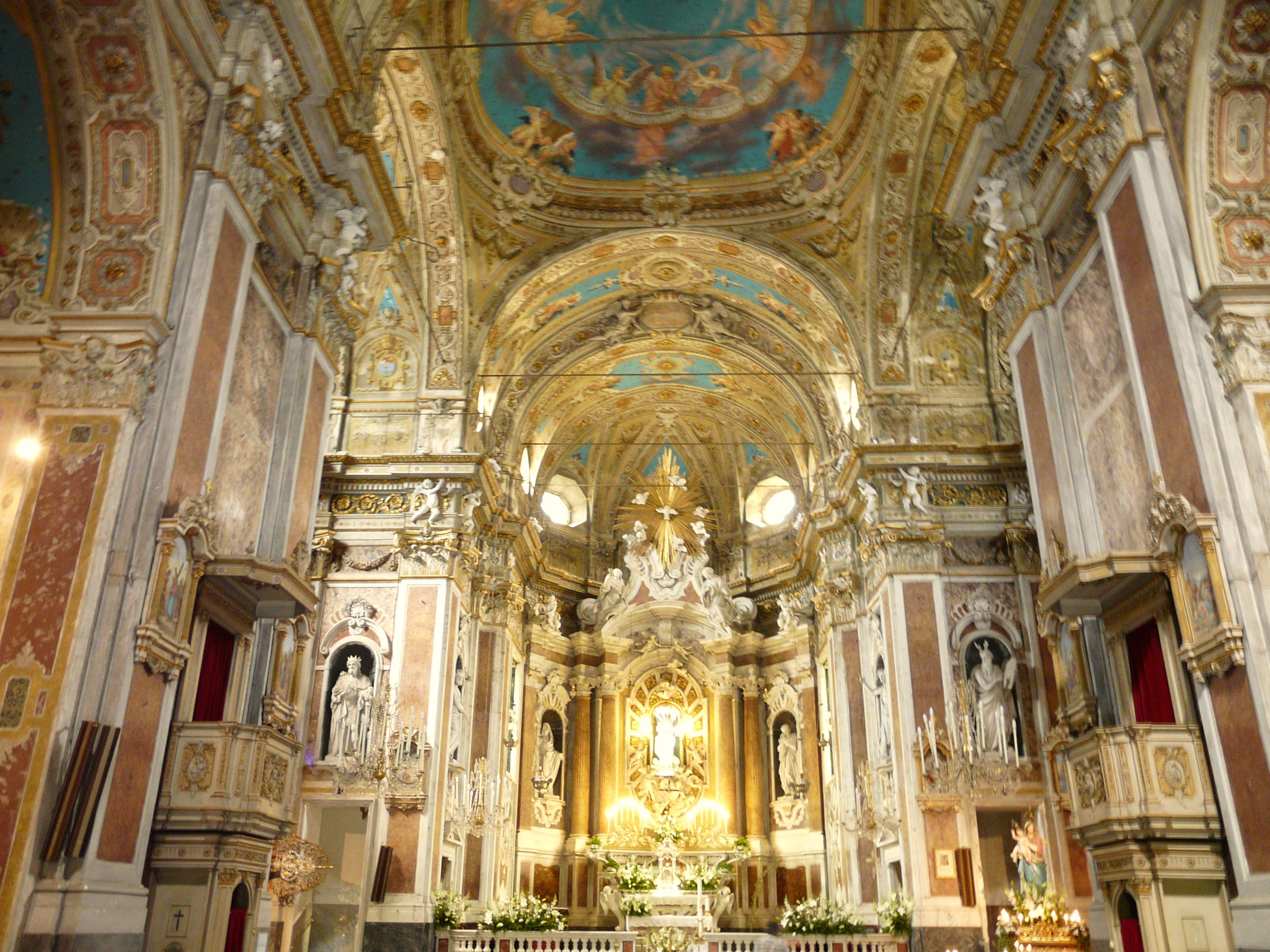 Serie di immagini del santuario di Nostra Signora dell'Acquasanta, Acquasanta, Comune di Genova, Liguria, Italia